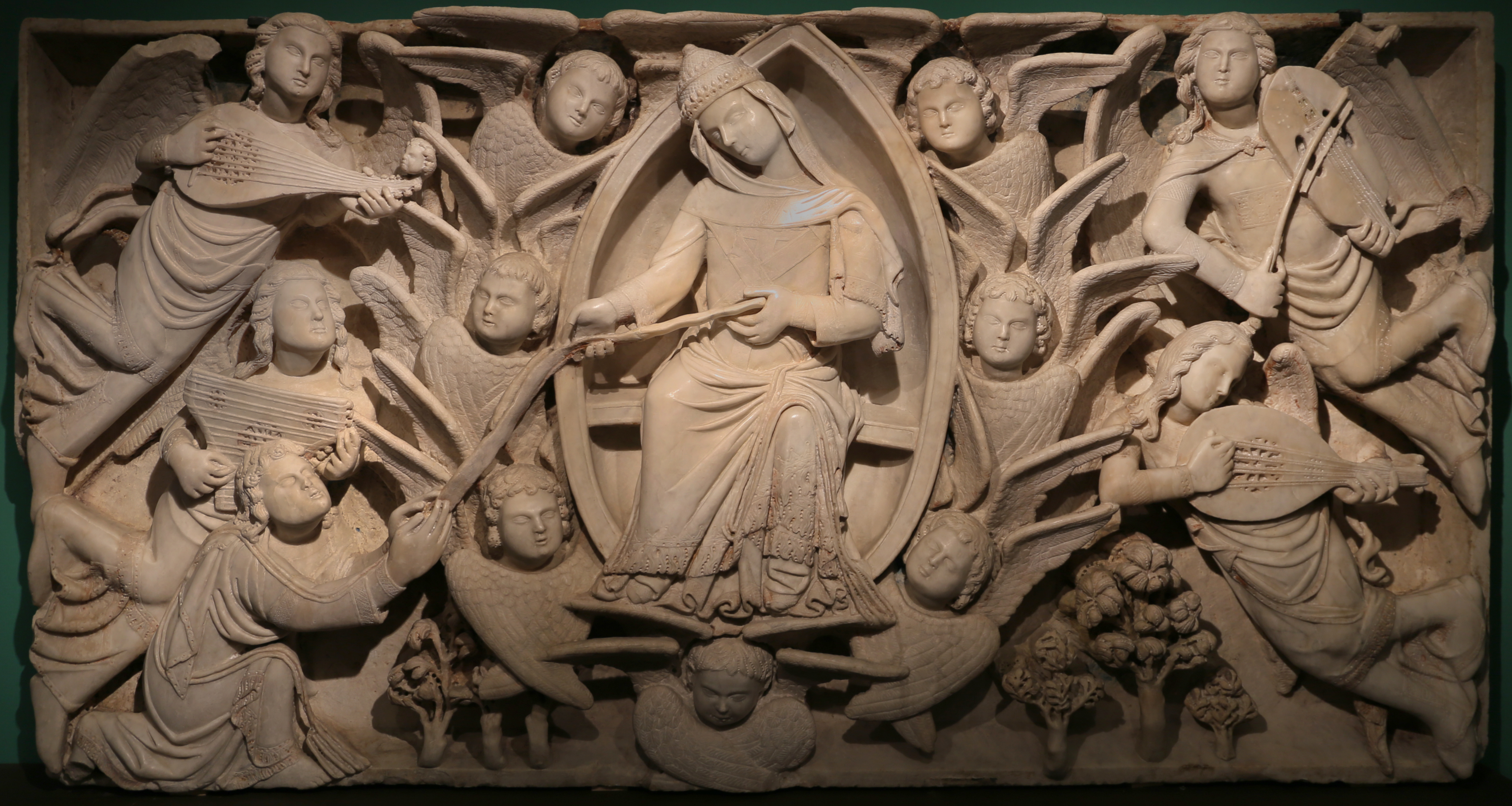 Museo civico (Prato) This is a photo of a monument which is part of cultural heritage of Italy.